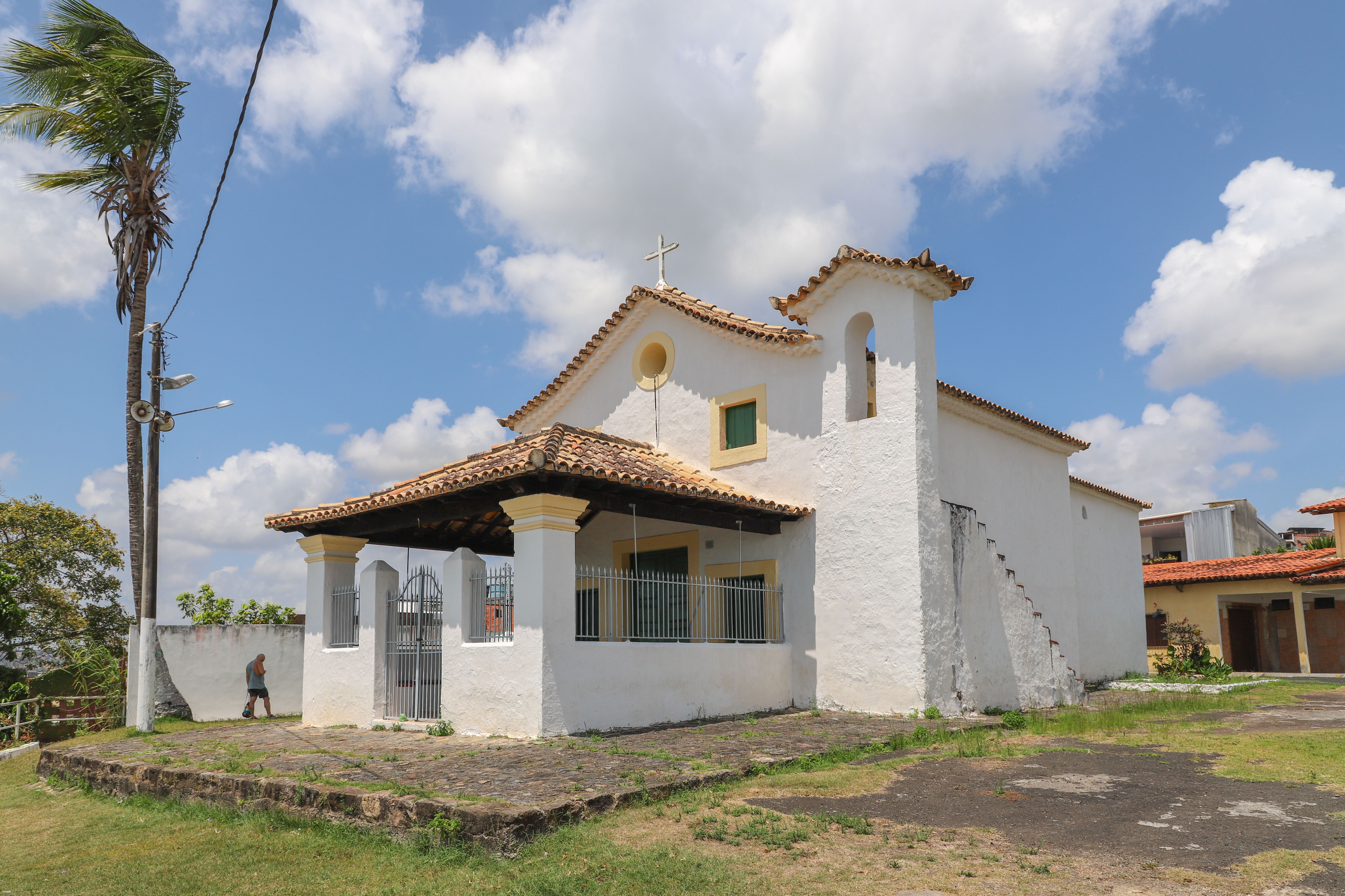 Capela de Nossa Senhora da Escada, Salvador, Bahia.